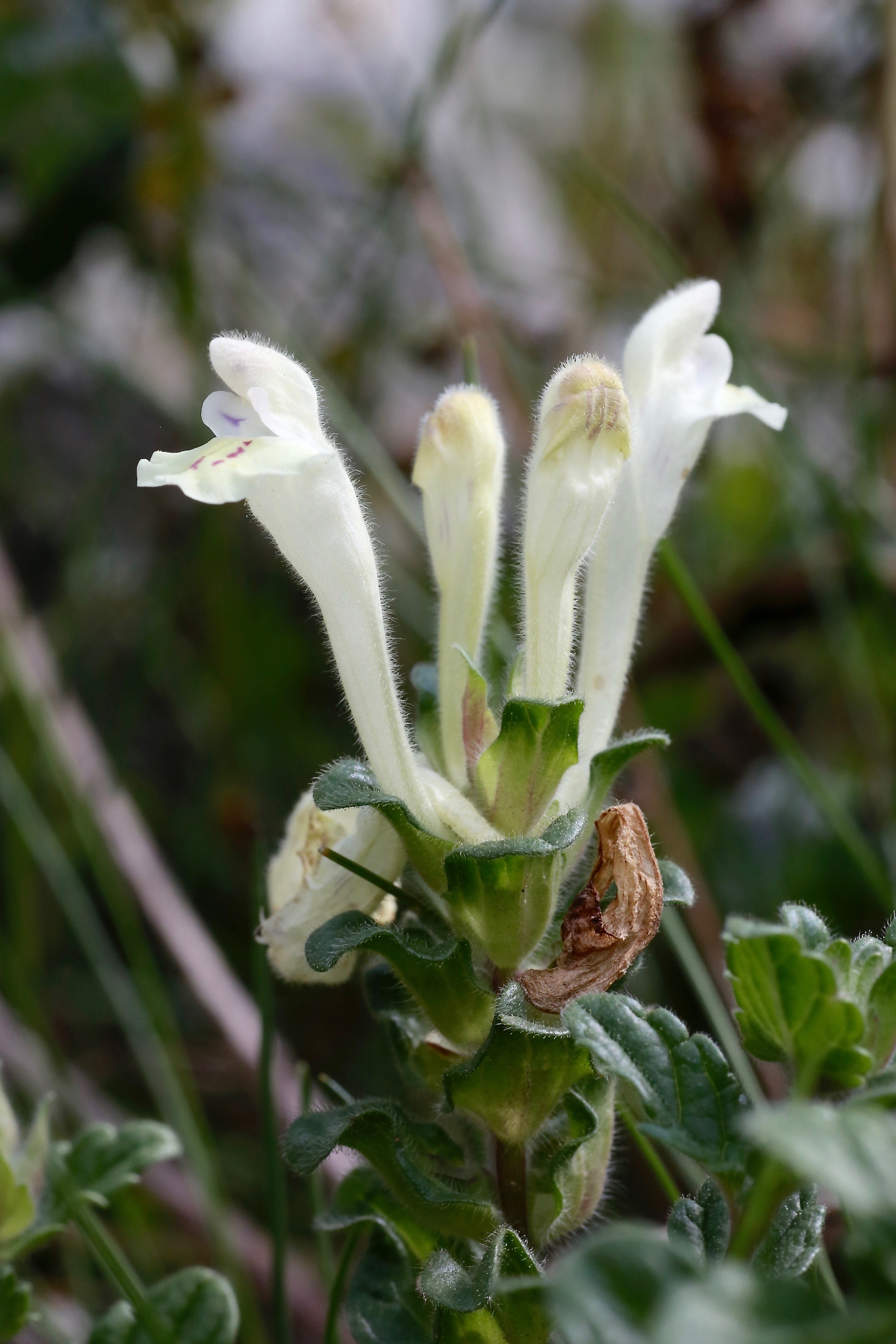 Kyrgyzstan, Issyk-Kul reg., Jety-Oguz distr., 15 km S Barskoon vill., Terskei Ala-Too Range, Barskoon gorge, near Barskoon river, 2400 m